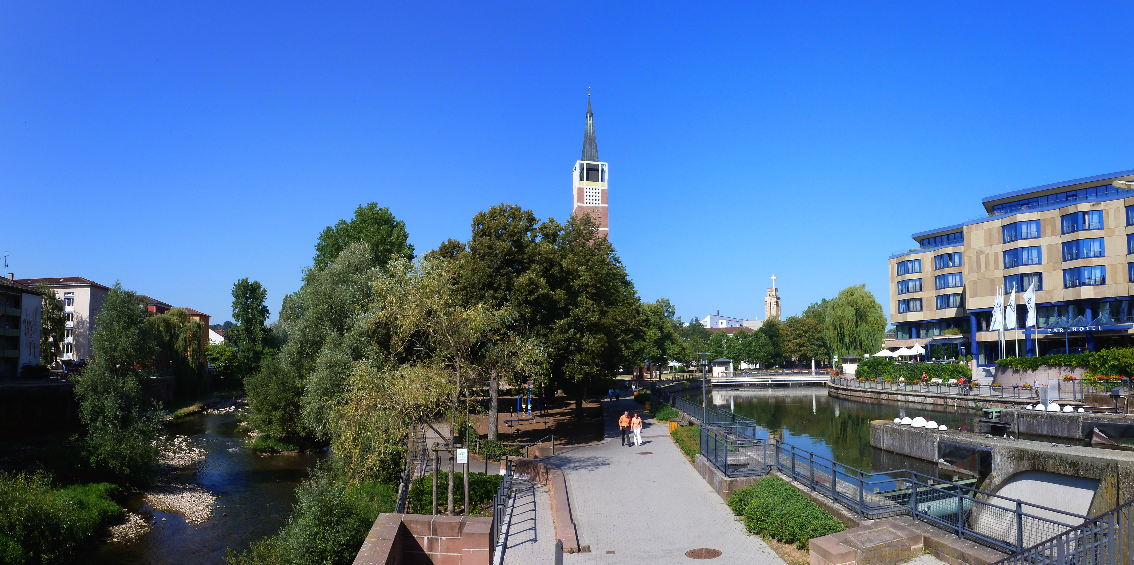 Panorama Nagold, Stadtkirche et Enz à Pforzheim (Bade-Würrtemberg) (projection cylindrique)